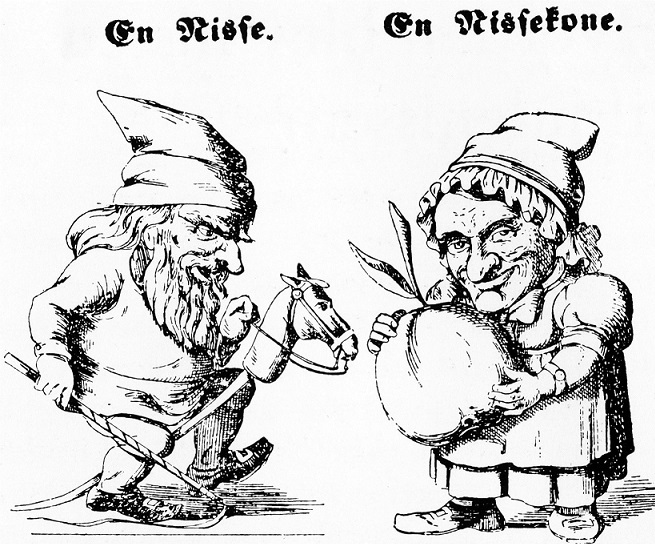 Nissemand og julekone.